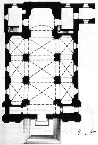 план костел Мурафа